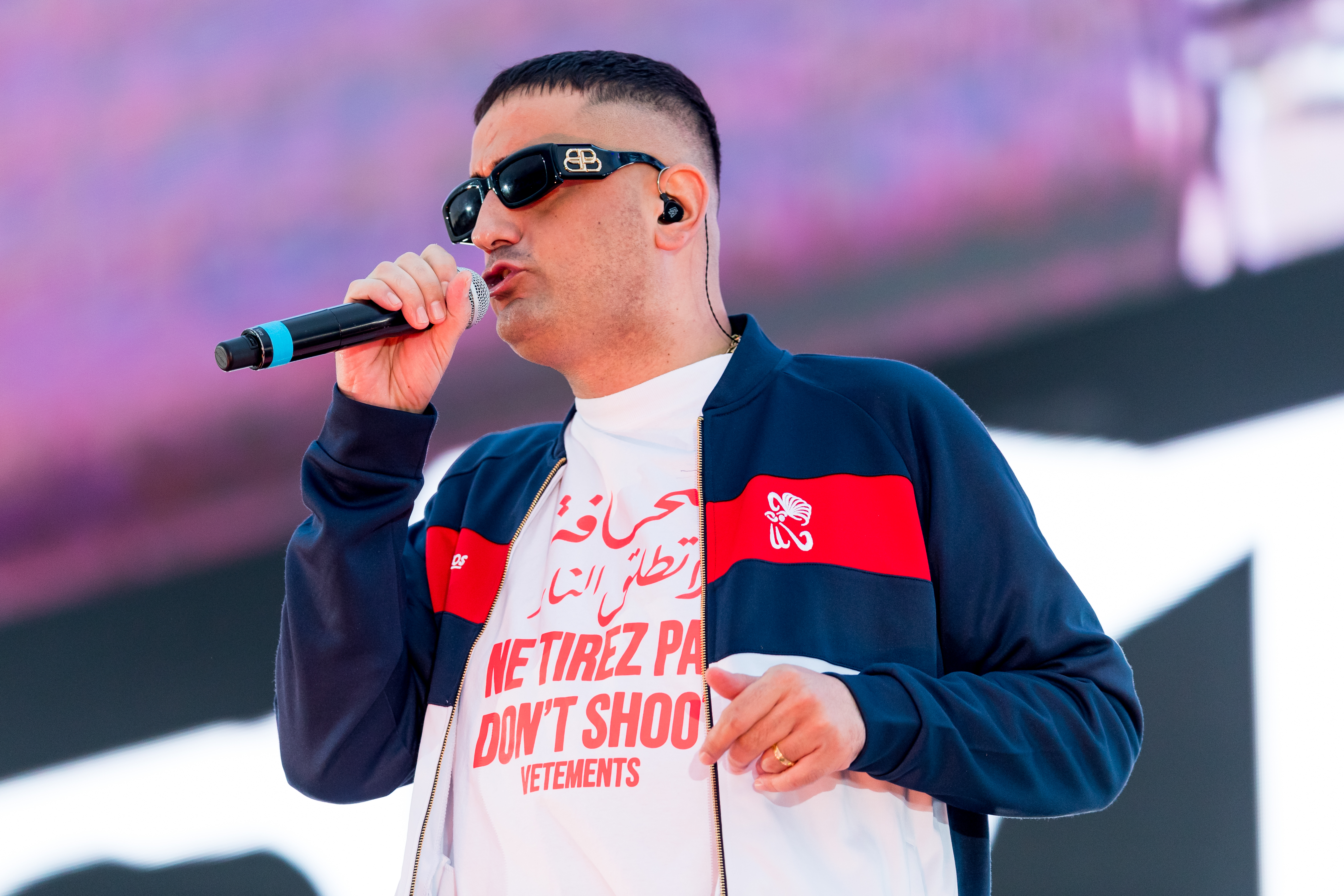 Haftbefehl during CARStival at Maimarktgelände, Mannheim, Baden-Württemberg, Germany on 2020-07-10, Photo: Sven Mandel Promotion: go7.ag